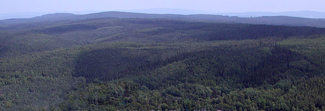 Der Kohlwald bei Arzberg in einer Luftaufnahme von Nord-Westen (retuschiertes Bild, Kraftwerk entfernt)